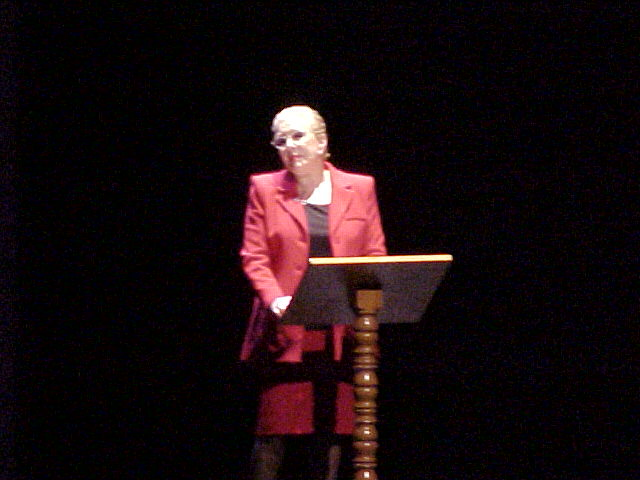 Lola Herrera durante la representación de "48 Voces", en Puerto del Rosario, Fuerteventura